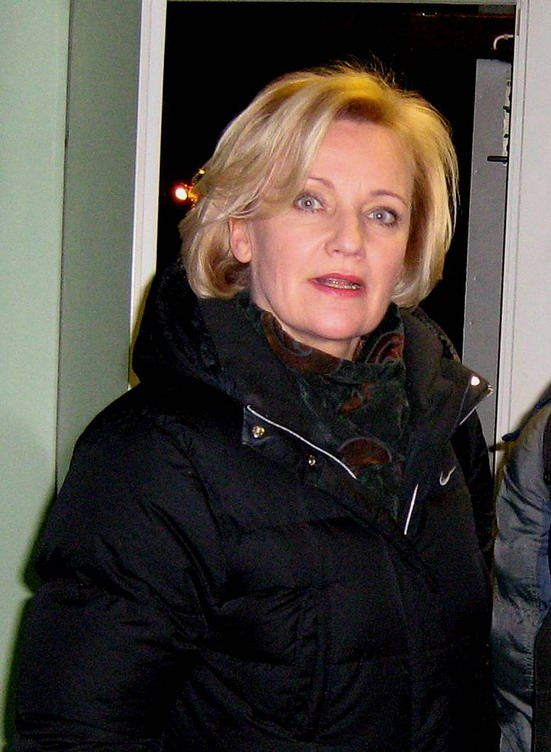 Maria Pakulnis (ur. 2 lipca 1956 w Giżycku) - polska aktorka filmowa i teatralna.